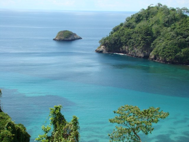 Bahía Waffer. Isla del Coco. Costa Rica.